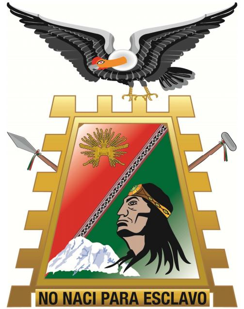 Escudo de la parroquia Cacha, Riobamba, Chimborazo